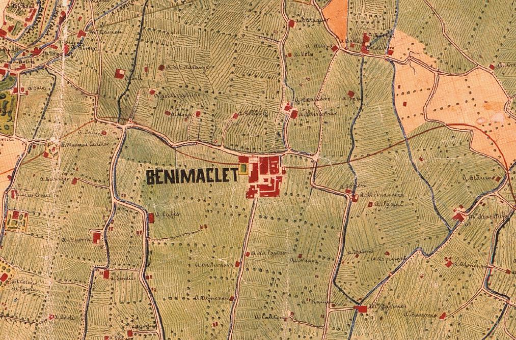 Benimaclet el 1883 (el nord està a la dreta).